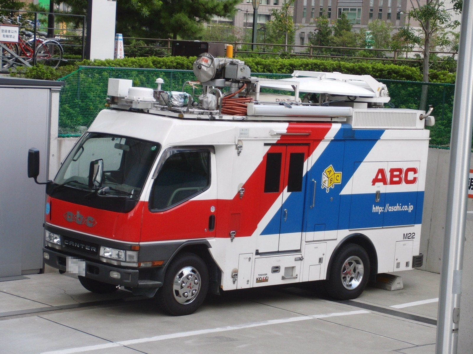 朝日放送の中継車を撮影。旧ロゴとキュキュが描かれている。